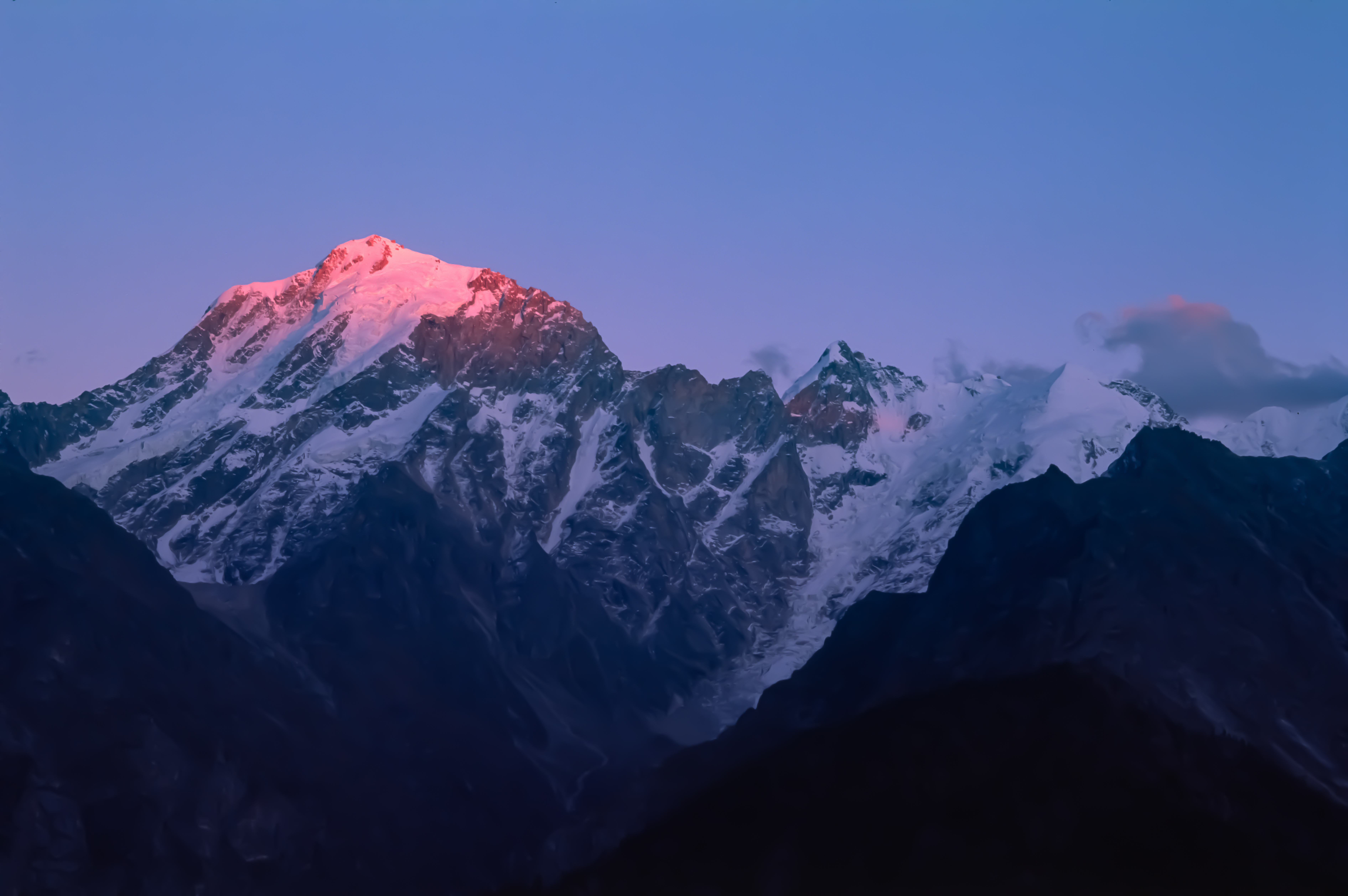 Mount Kinnaur Kailash